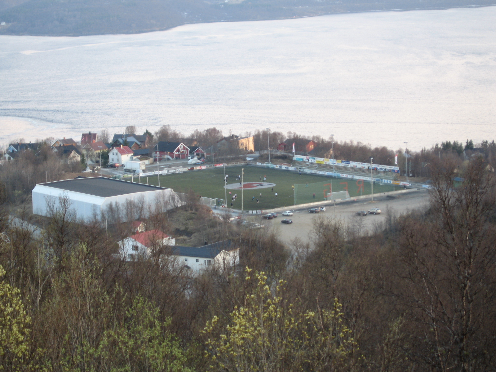 Finnsnes stadion